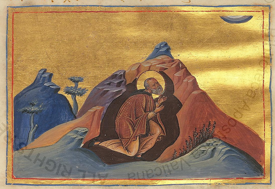 Константинополь. 985 г. Миниатюра Минология Василия II. Ватиканская библиотека. Рим.